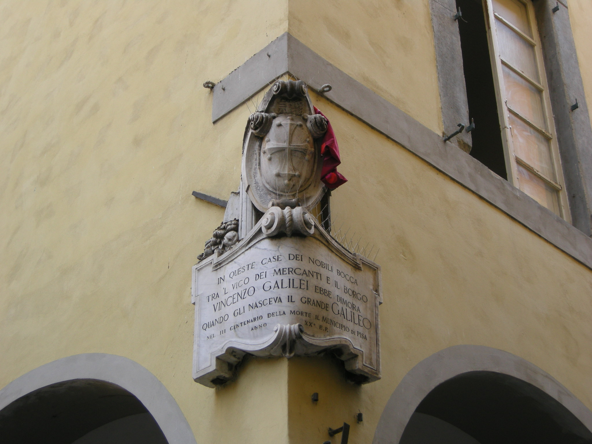 Borgo stretto, targa vincernzo galilei, pisa